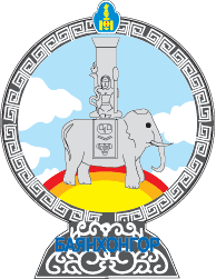 Coat of arms of Bayankhongor Aymag, Mongolia